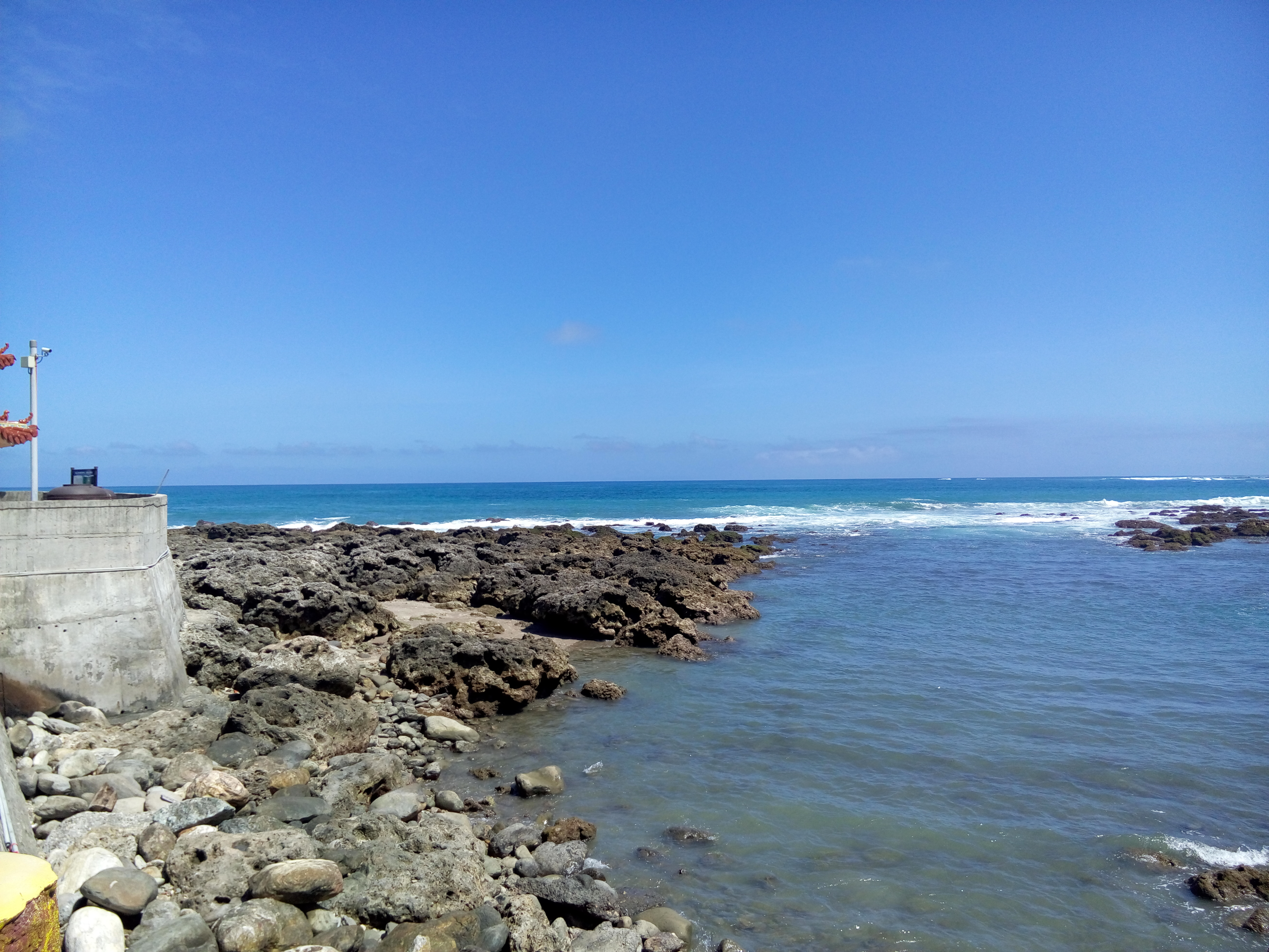 中文（台灣）: 中華民國(臺灣)臺東縣杉原漁港中文（中国大陆）: 台湾台东县杉原渔港